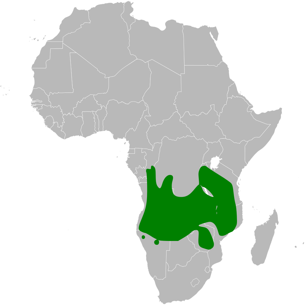 Parus rufiventris distribution map